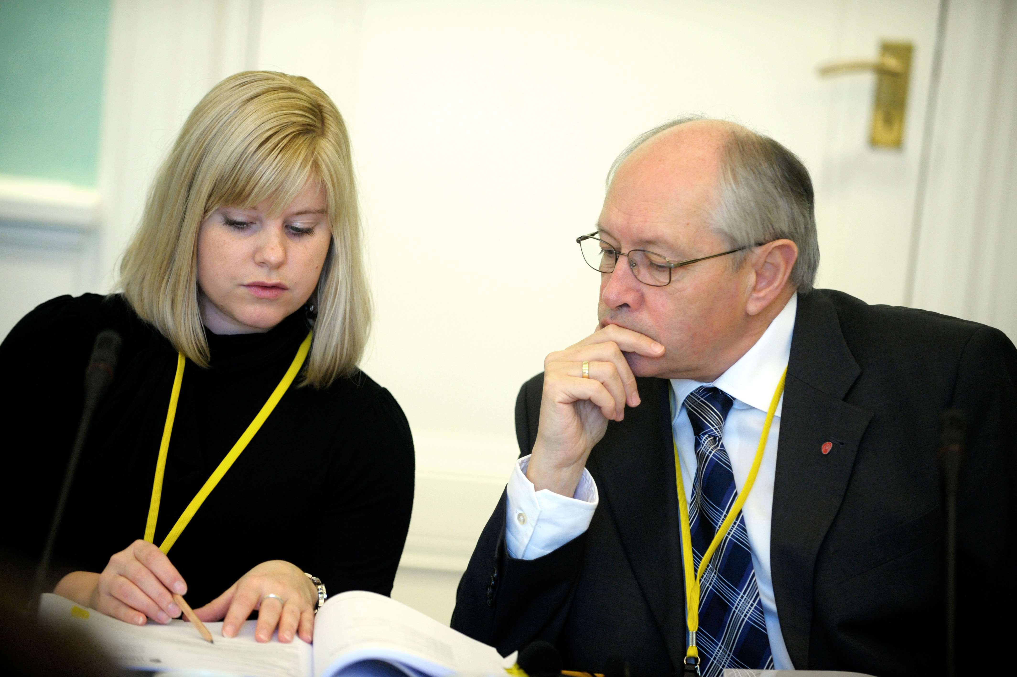 Anna Ljunggren och Martin Kolberg från Norge på medborgar- och konsumentutskottet möte sessioen 2009.